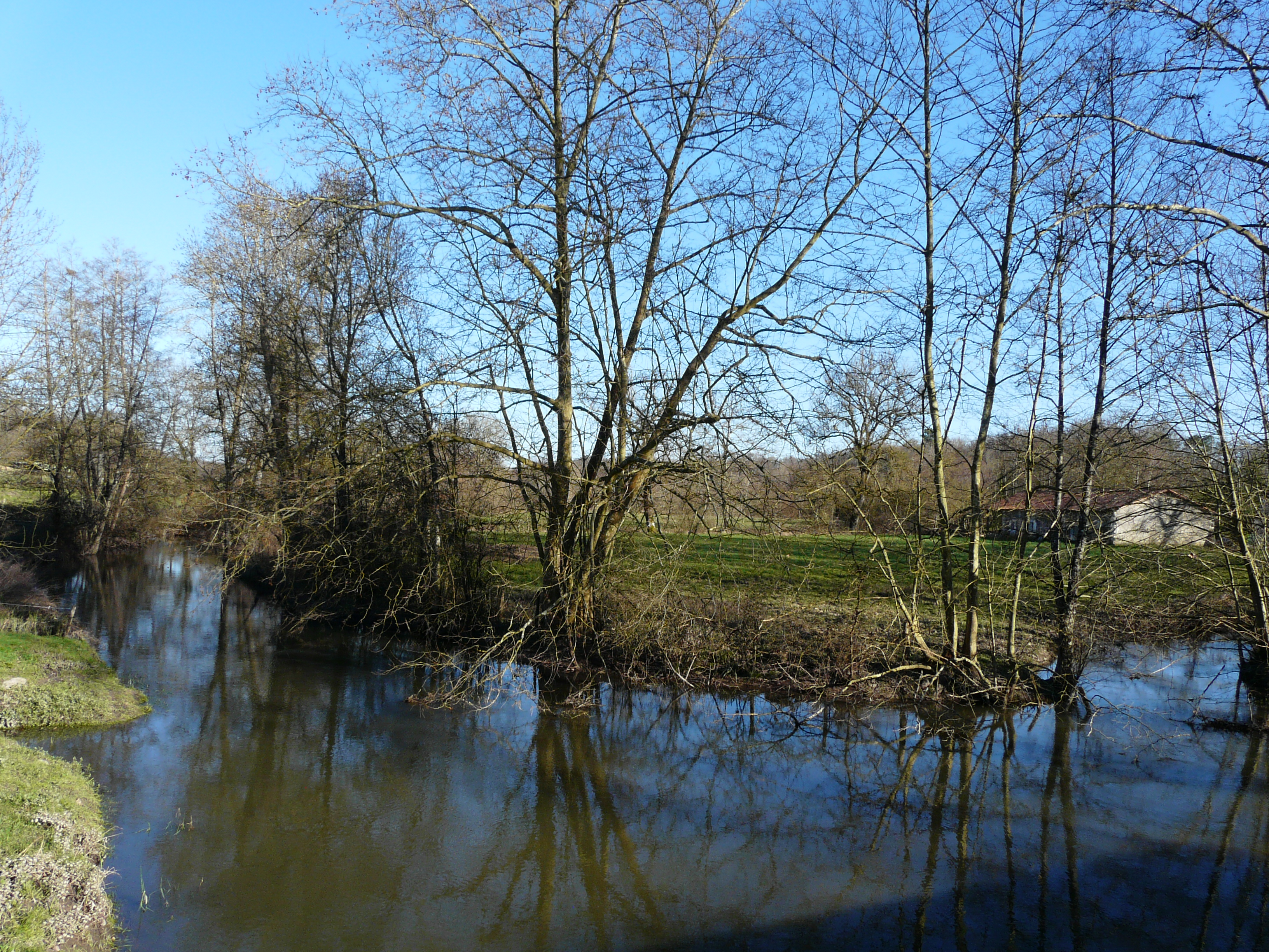 La Rizonne en amont du pont du Moulin de Rafaly, Saint-Vincent-Jalmoutiers, Dordogne, France.